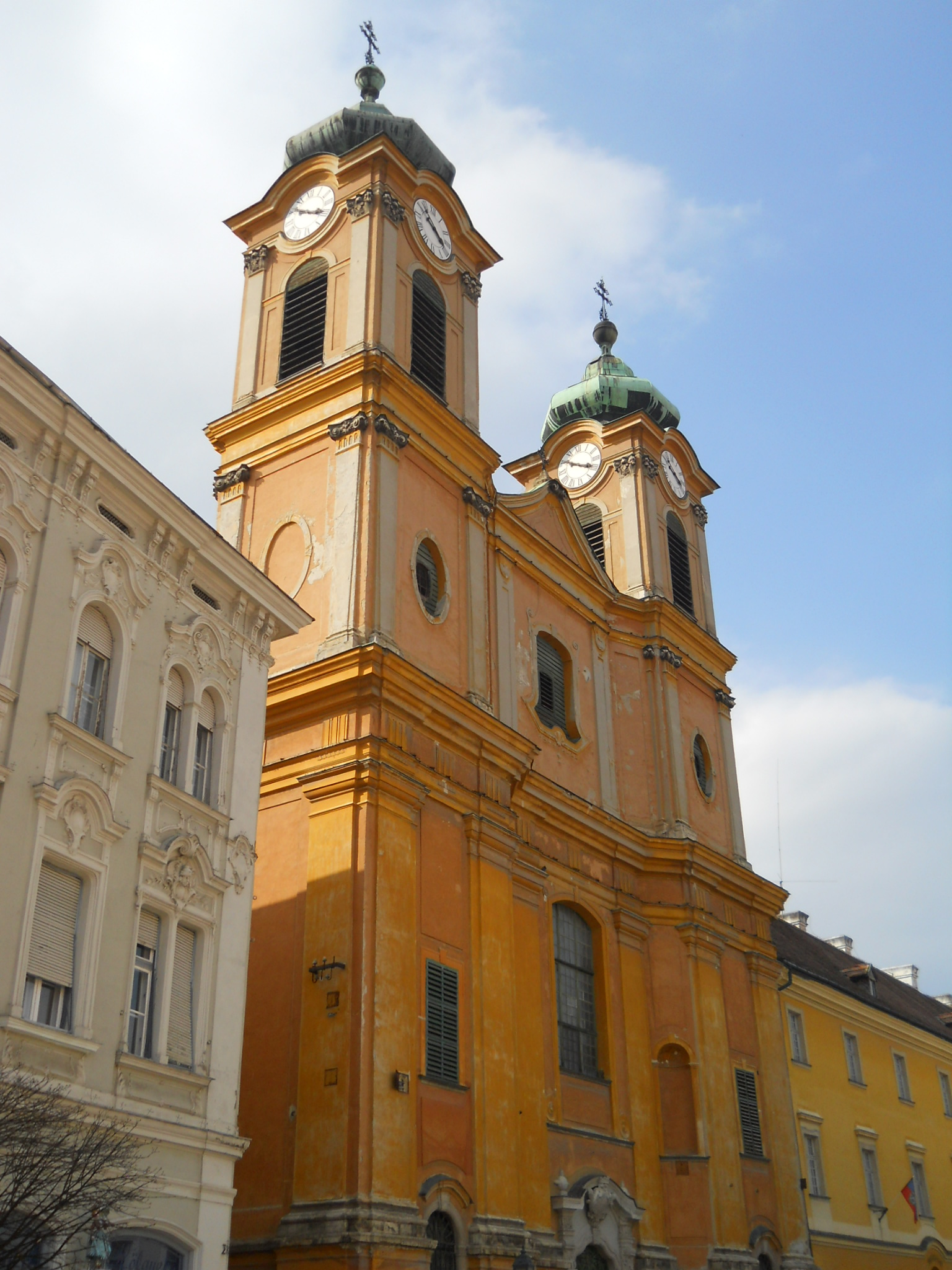 Székesfehérvár - cisztercita templom